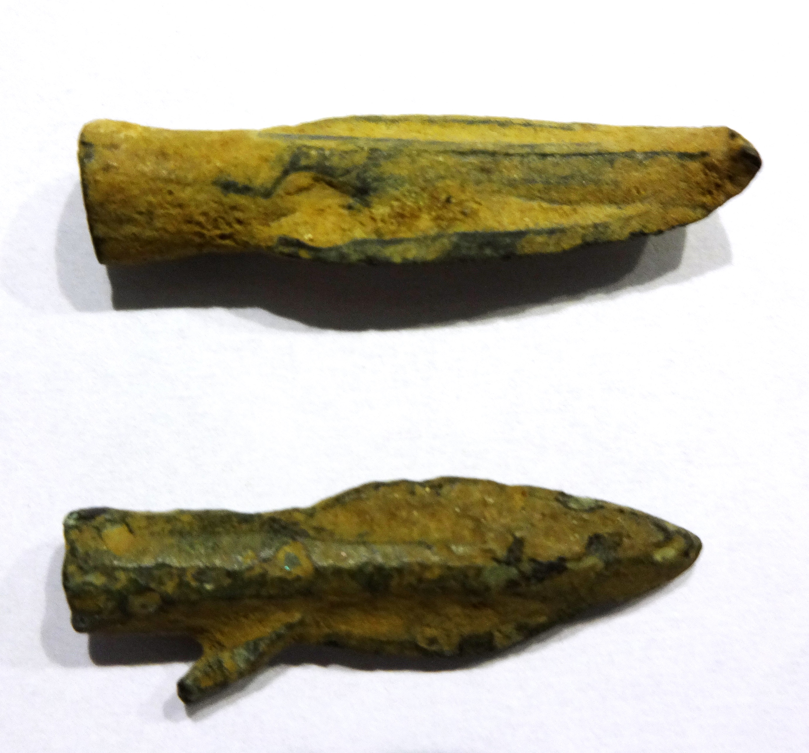 Antike Pfeilspitzen, mit Widerhaken für militärische (unten) und ohne für jagdliche Verwendung (oben)